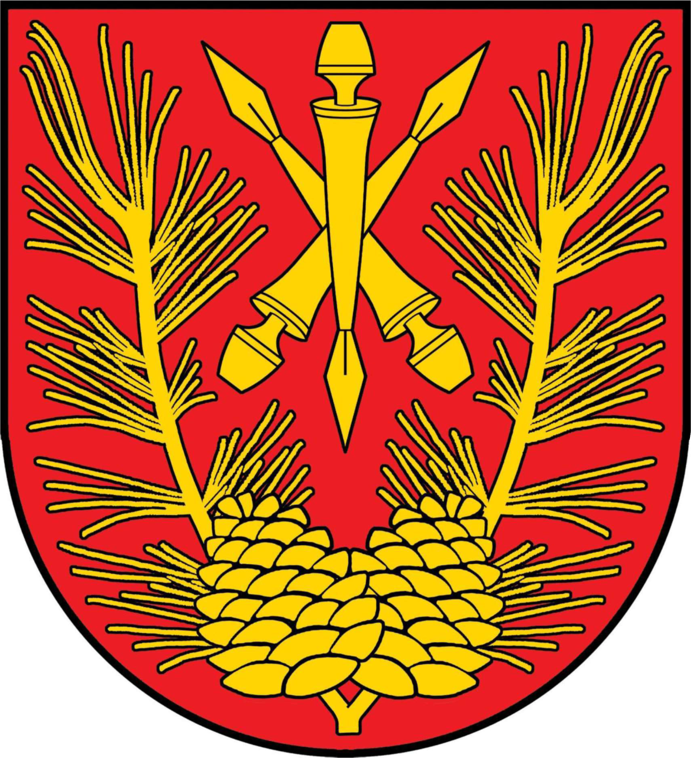 Herb gminy Dzwola